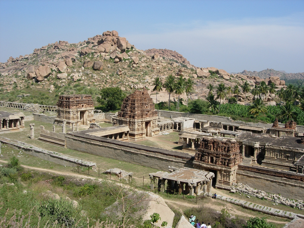 Achyutaraya temple in hampiDSCN0996